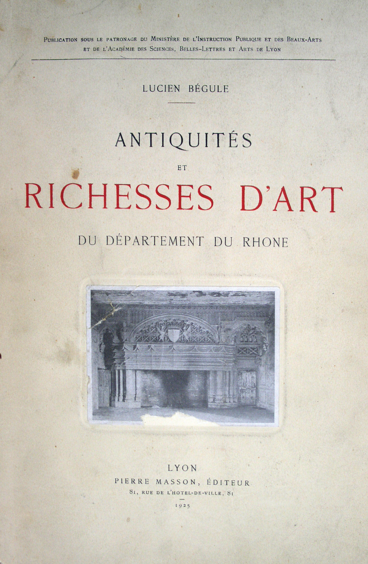 Livre richesses d'art du département du Rhône